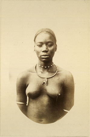 Angehörige der Mangbetu (19. Jahrhundert).